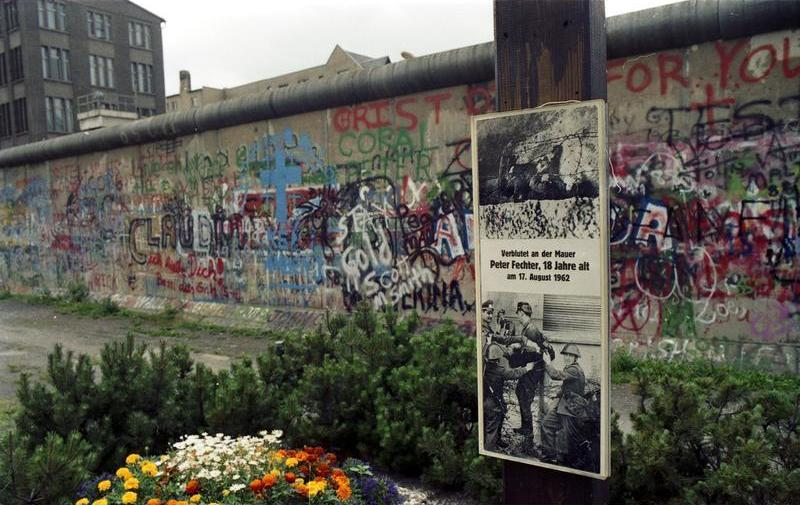 Juni 1988 Berlin (West), Mauer